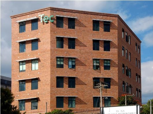 Edificio TEC Guatemala